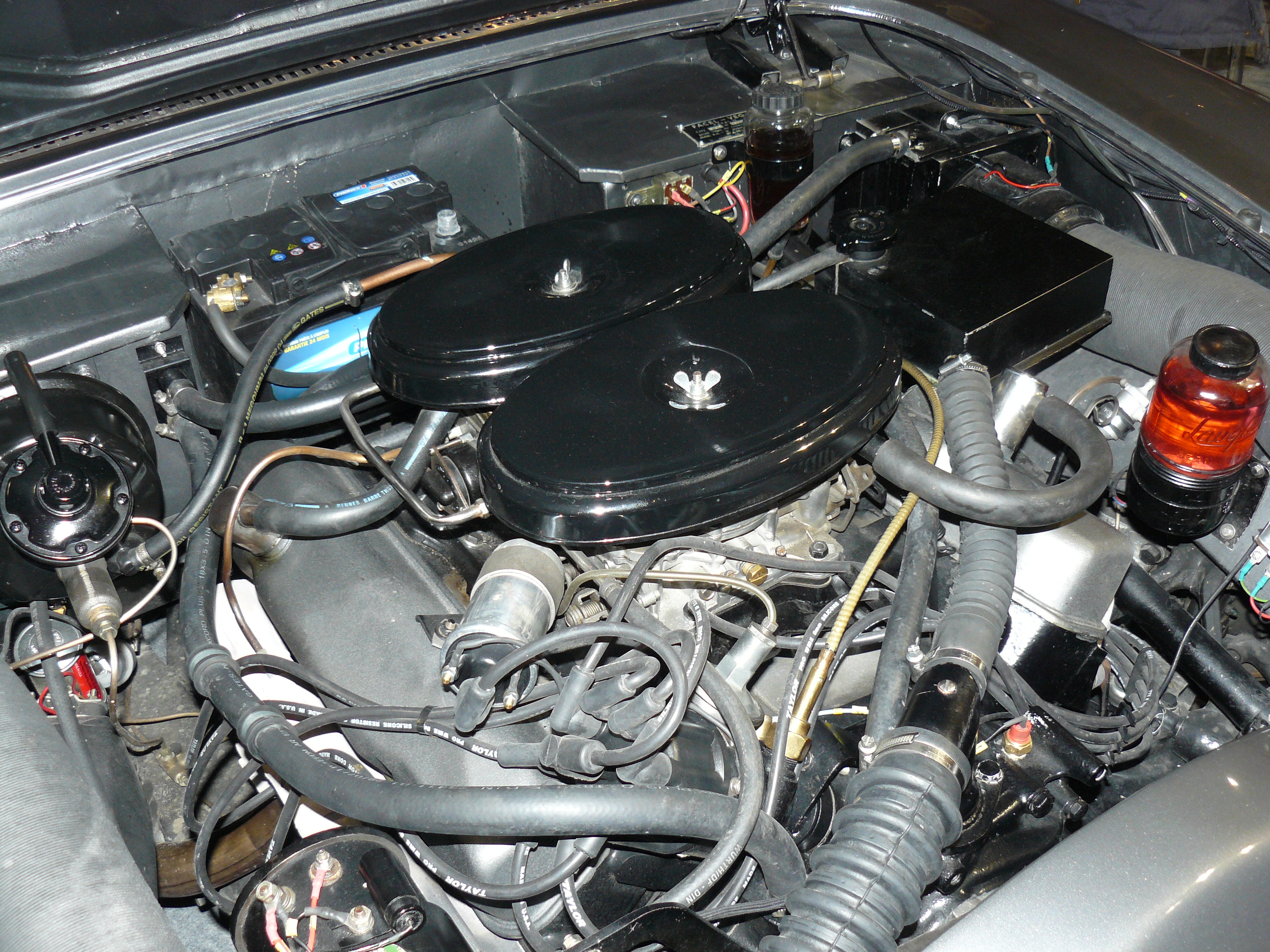 Retromobile 2013